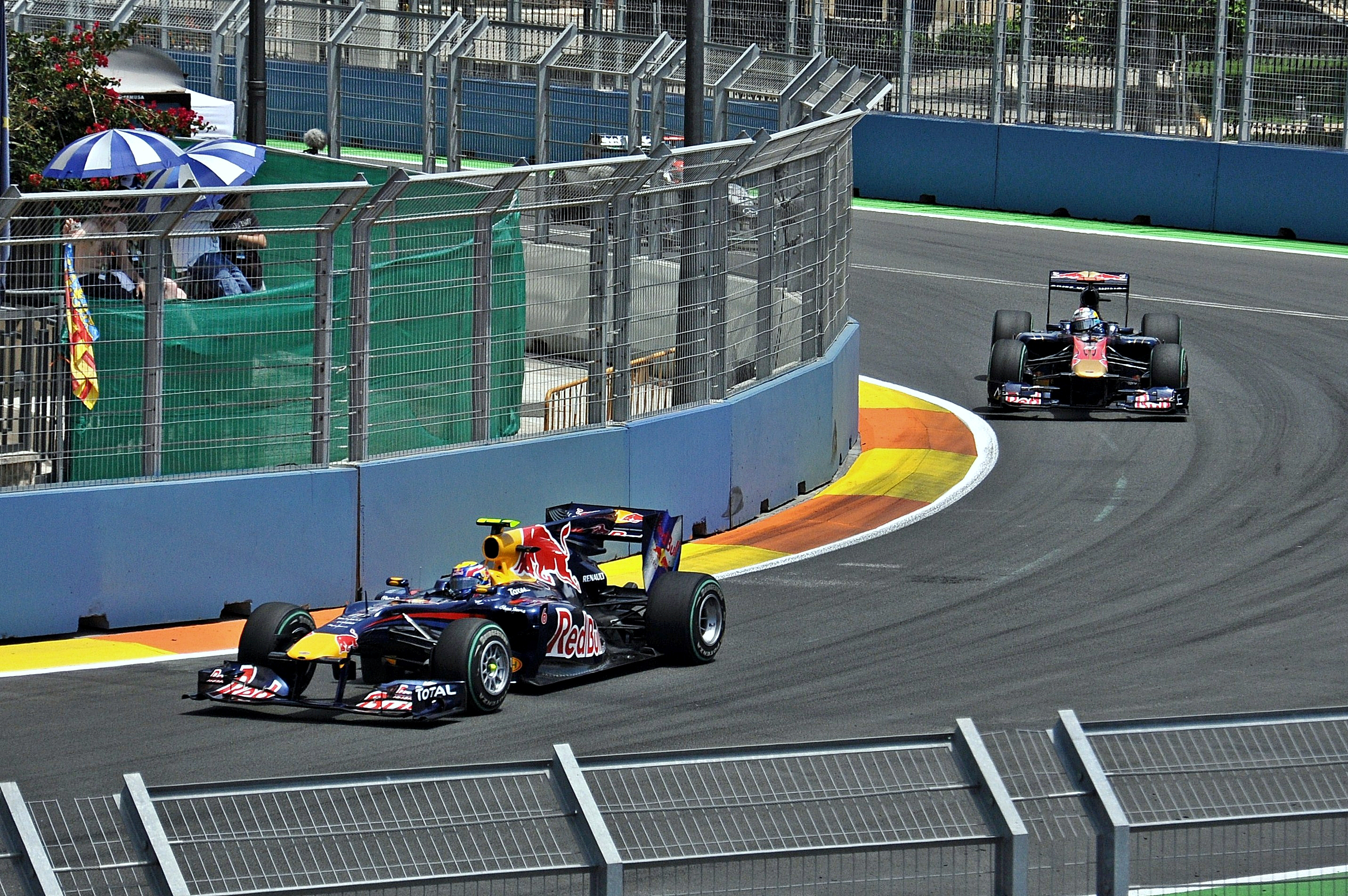 circuito de valencia-2010